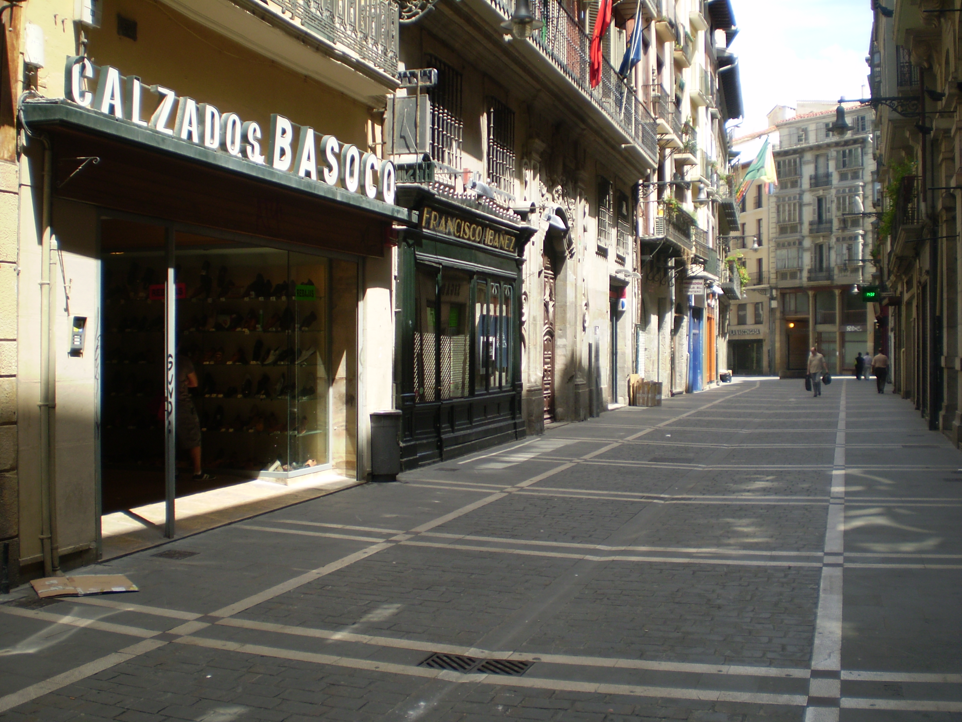 Calle Zapatería de Pamplona (Navarra-España)